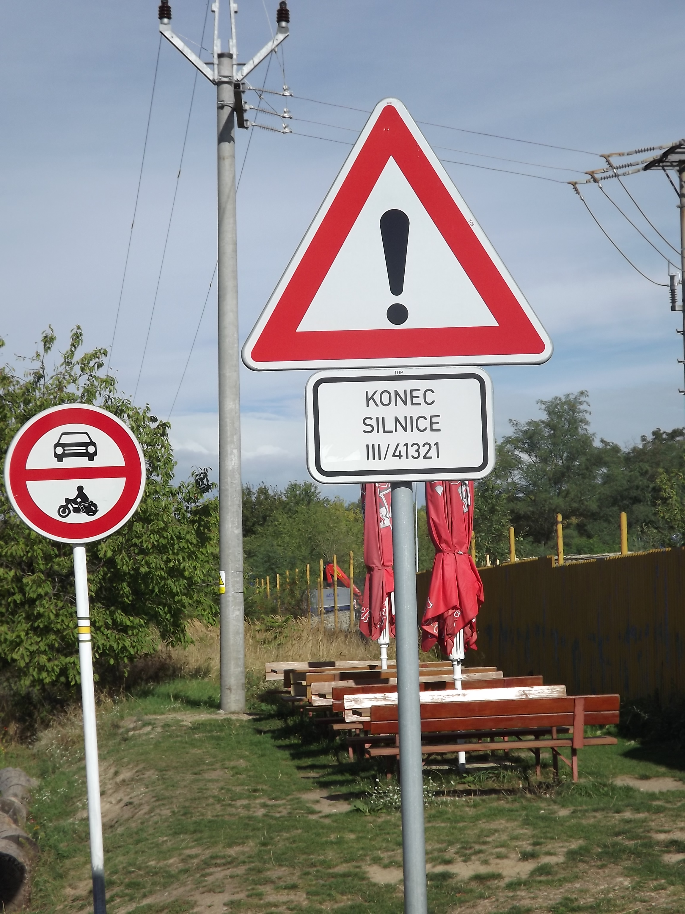 Konec silnice III/41321